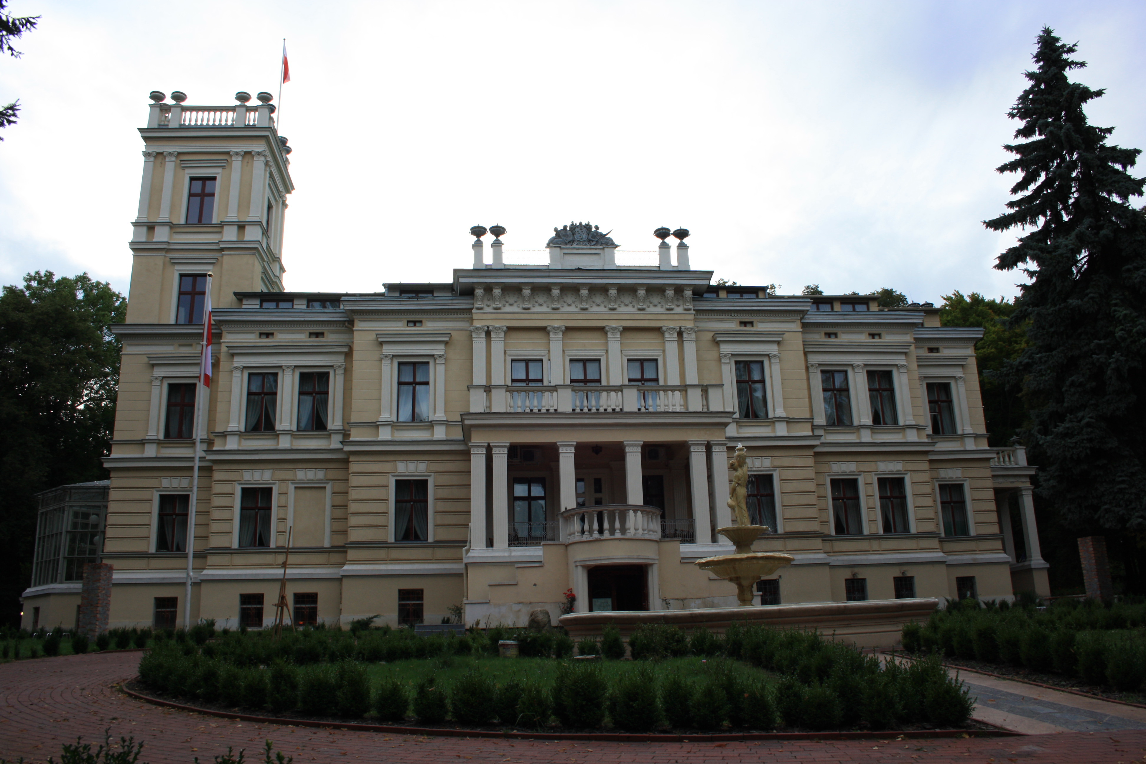 Biedrusko, pałac, 1877-80